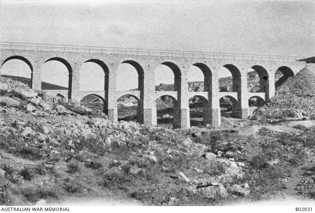 גשר הרכבת החיג'אזית לייד עמאן שהיוותה את המטרה לקרב עבר הירדן הראשון